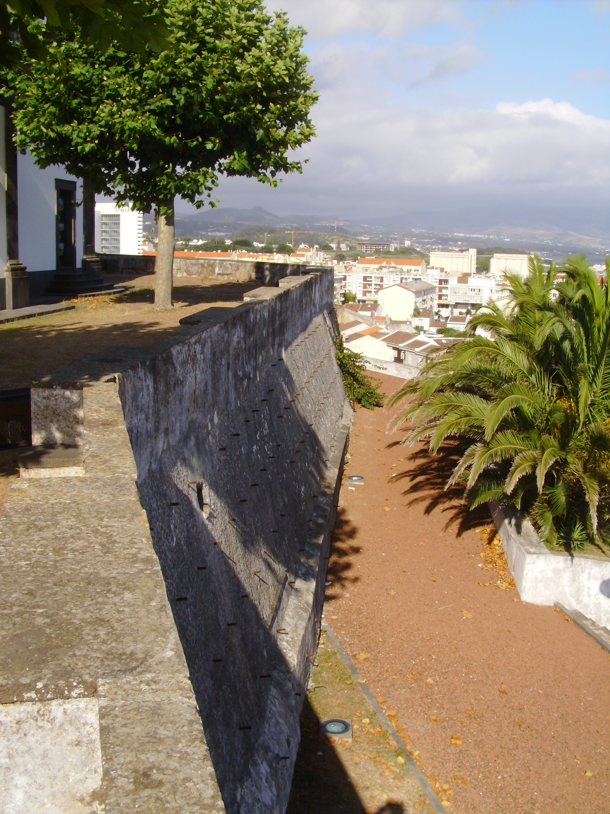 Ermida da Mãe de Deus, freguesia de São Pedro, concelho de Ponta Delgada, ilha de São Miguel, Açores: aspecto do muro.